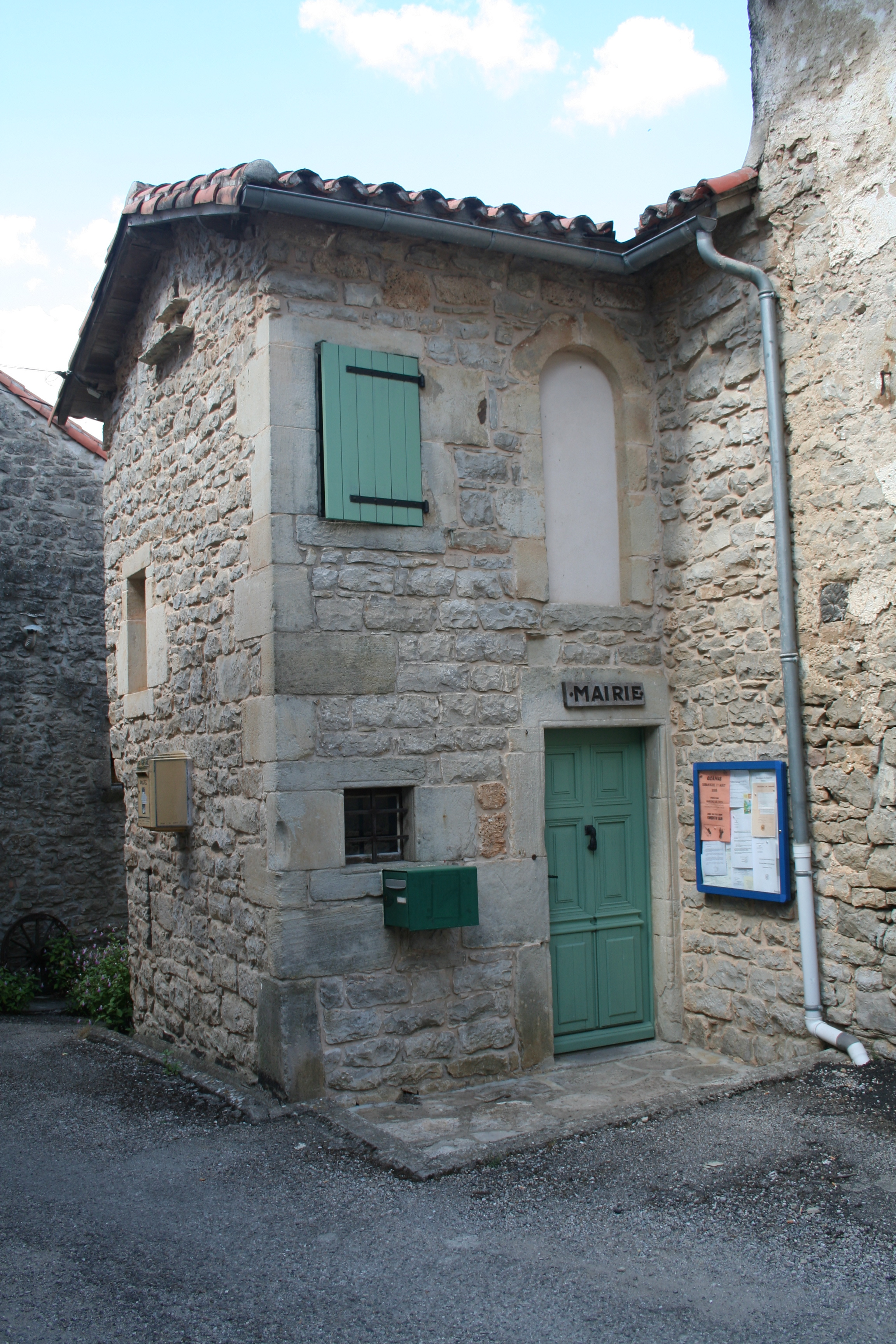 Saint-Beaulize (Aveyron) - mairie.